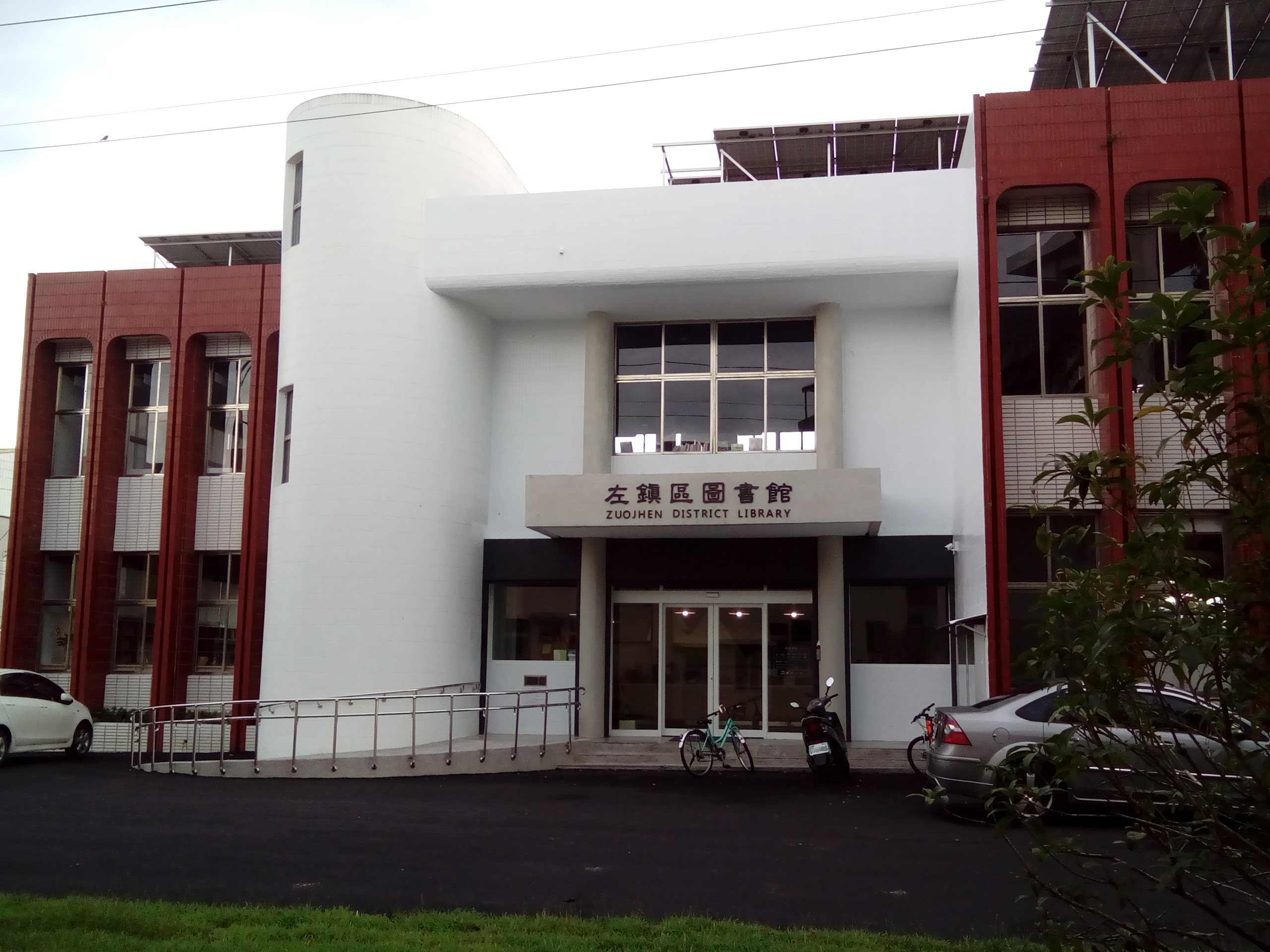 臺南市左鎮區圖書館